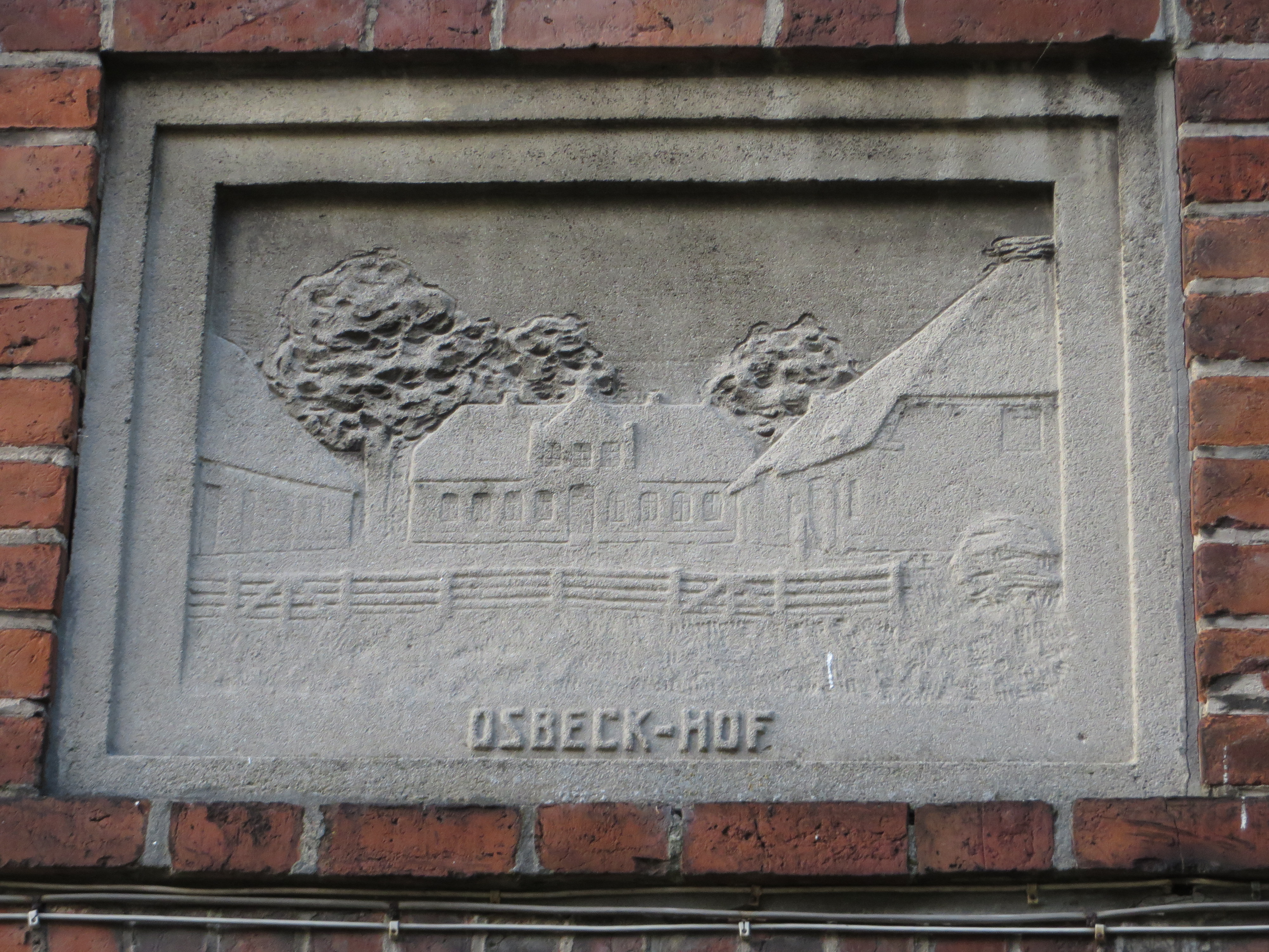 Relief Osbeck-Hof, Bild 04